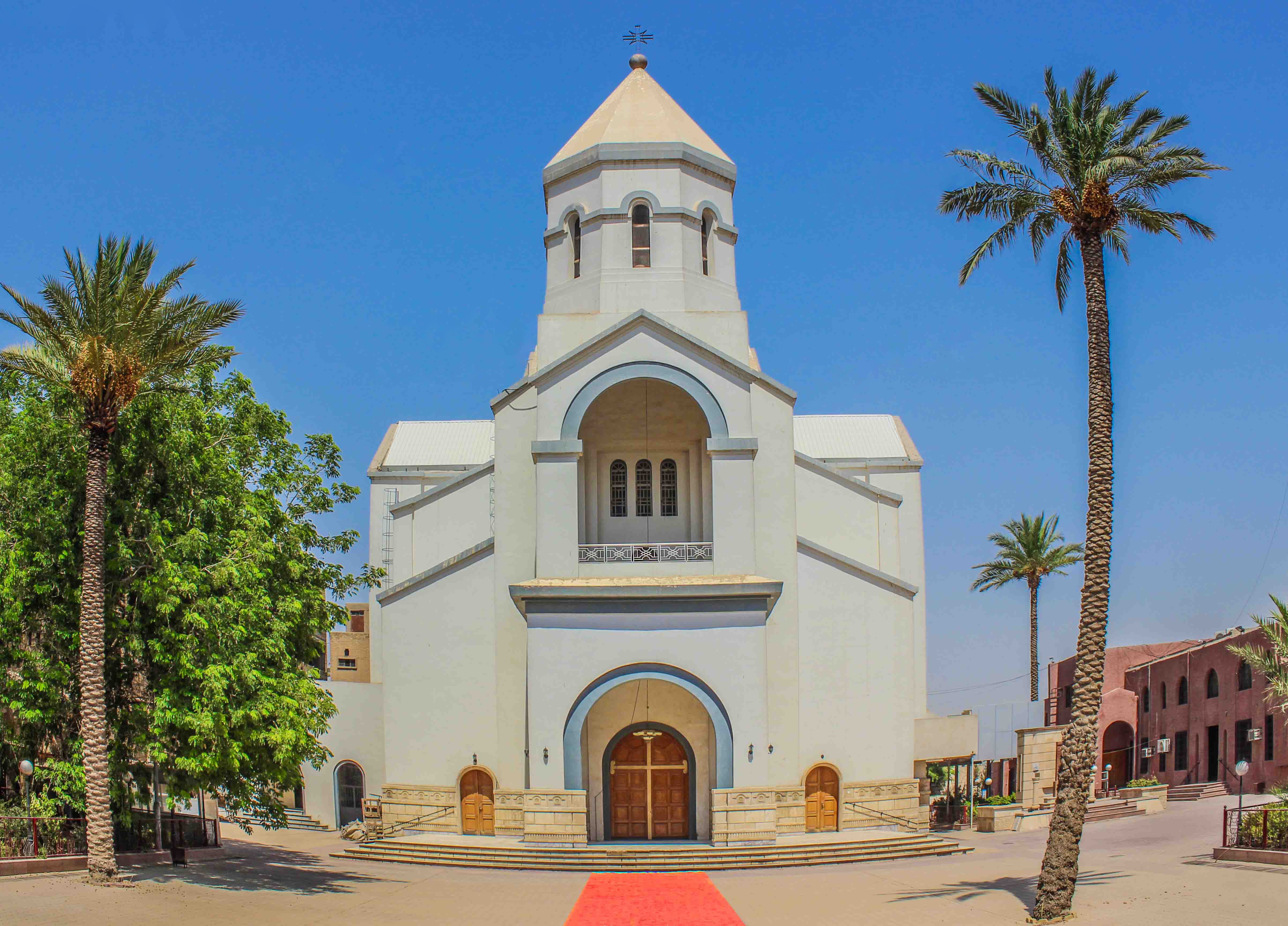 الشكل الخارجي للكنيسة . الصورة 2015